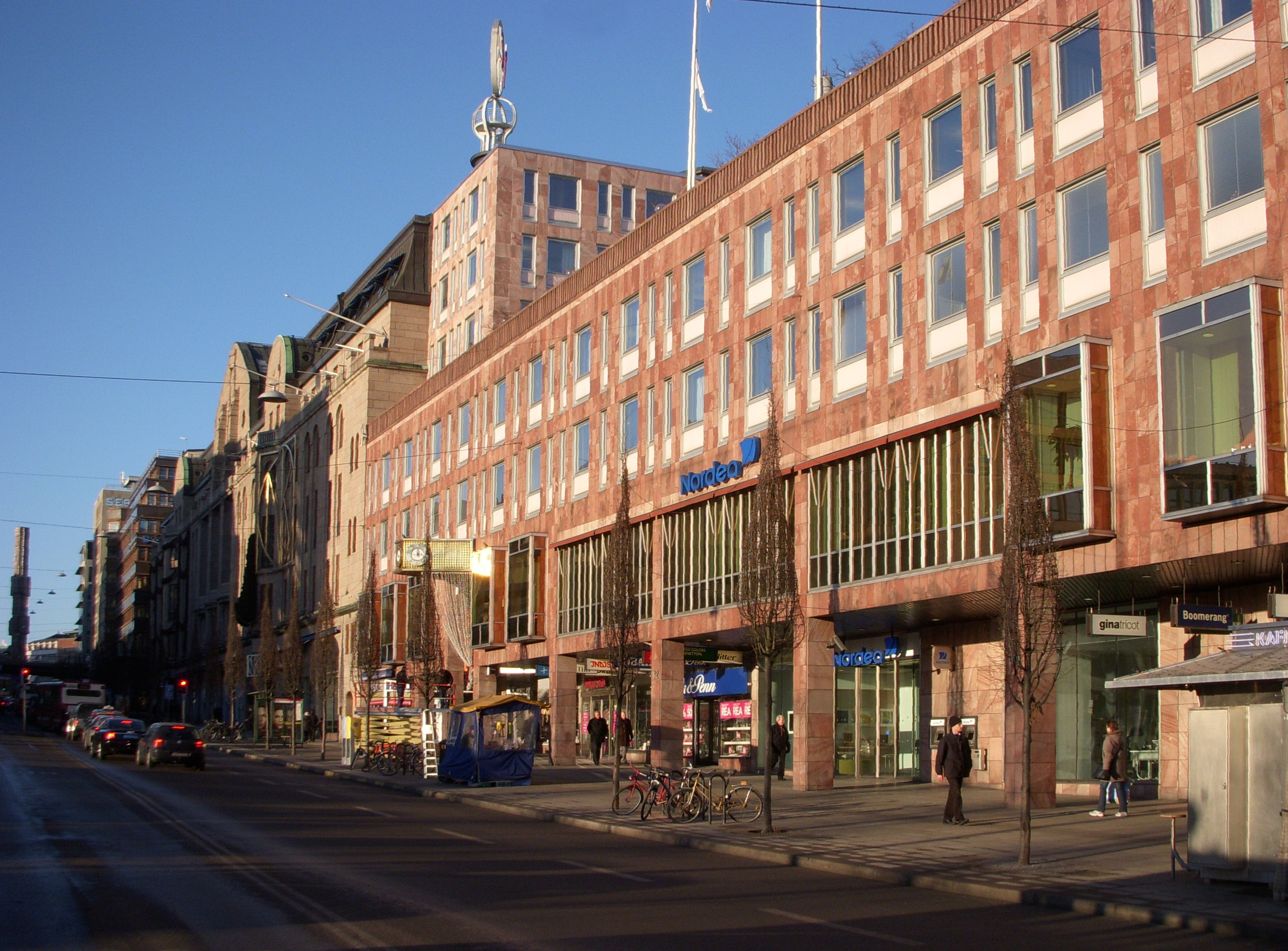 PK-huset, Hamngatan i Stockholm